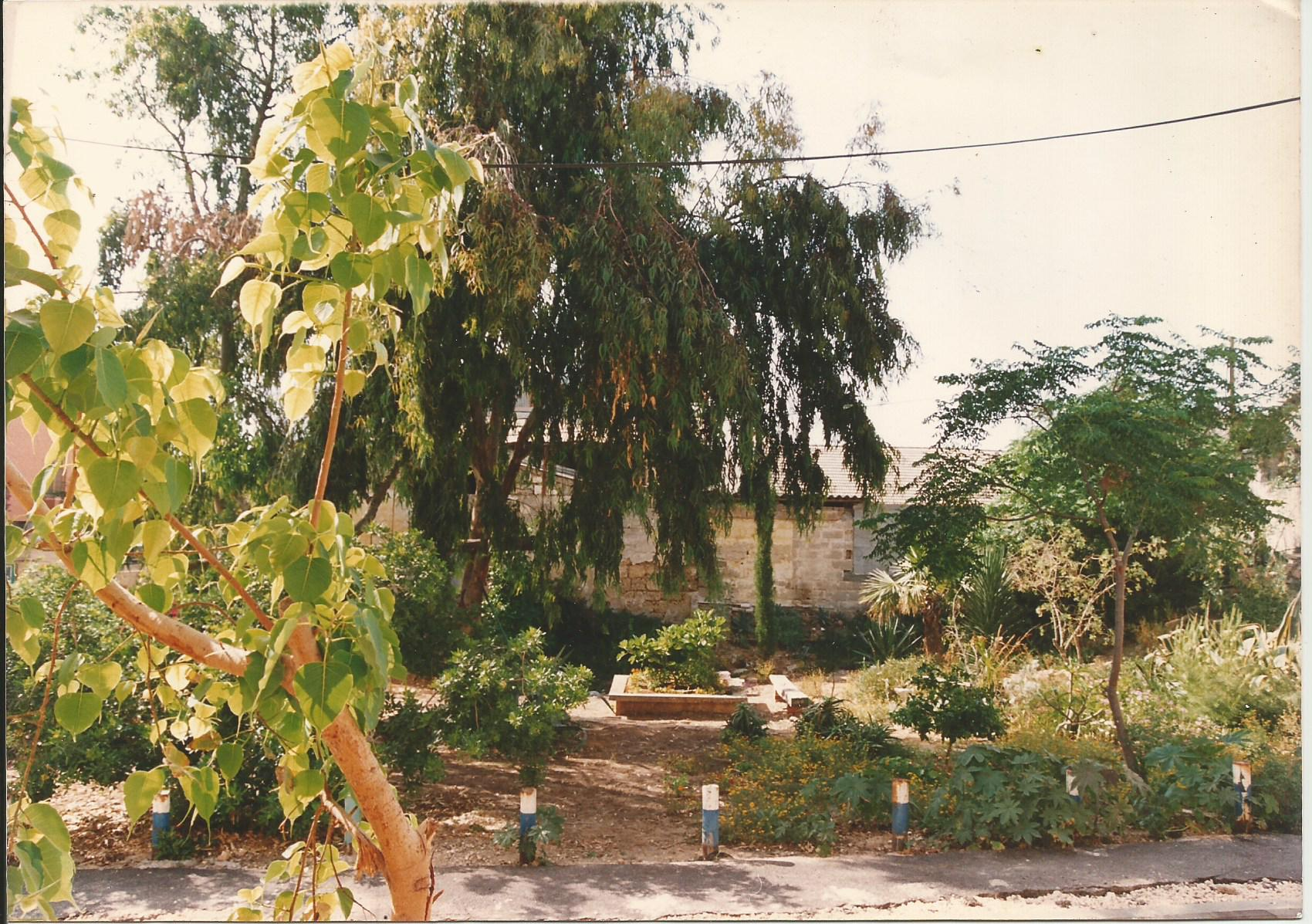 הגינה הקהילתית הראשונה בישראל. הוקמה בשנת 1983 על ידי קבוצה מתושבי שכונת נוה צדק, ביזמת דוד הירש, תושב השכונה דאז, אשר גם פיתח וטיפח אותה במשך השנים. בשנת 1993הוכרזה הגינה כגינה ציבורית על ידי עיריית תל אביב ומאז העירייה היא שמתחזקת אותה. הגינה שוכנת בקרן הרחובות שלוש ושטיין, מול הכניסה הצפונית מזרחית למתחם מרכז סוזן דלל, ומשתרעת על שטח של כמחצית הדונם. העצים והצמחים המאכלסים את הגינה כיום, לרבות שני עצי האיקליפטוס הגדולים במרכזה, הם אותם העצים והצמחים אשר נשתלו וניטעו בה בשנות ה-80. קיומה של הגינה הובטח סופית רק בשנת 2006 כאשר, בעקבות מאבק ציבורי, בוטלה החלטה של מנהל מקרקעי ישראל להוציא את שטח הגינה למכרז לבניה למגורים. התמונה צולמה בשלהי שנות השמונים מכוון חצר ביתו של דוד הירש ברחוב שטיין.ן.